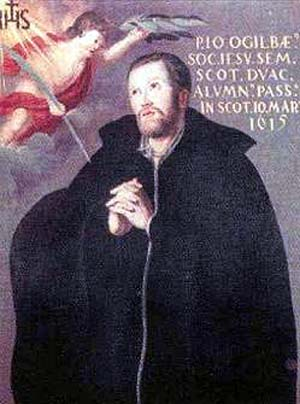 św. John (Jan) Ogilviie